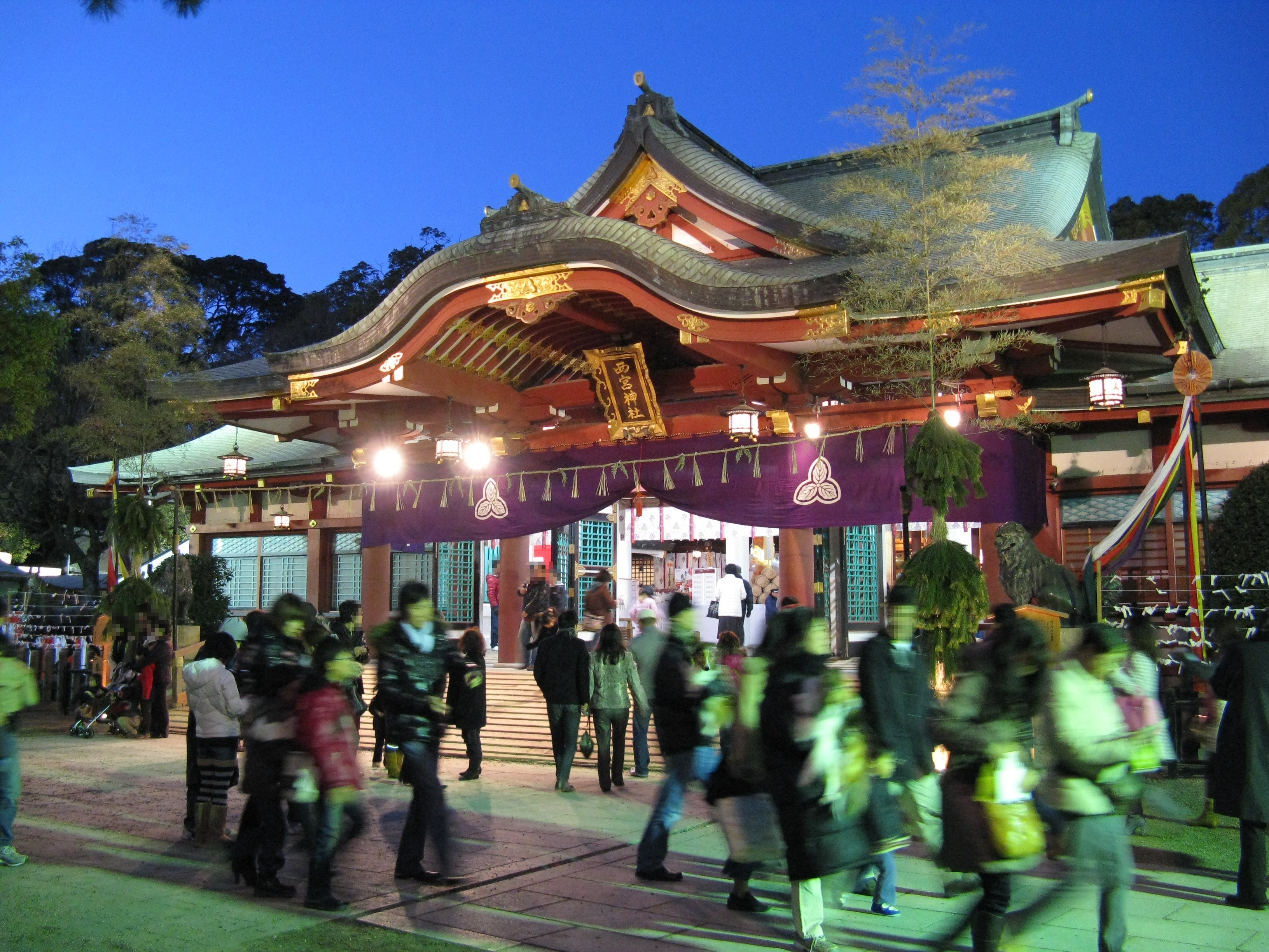 西宮神社 拝殿